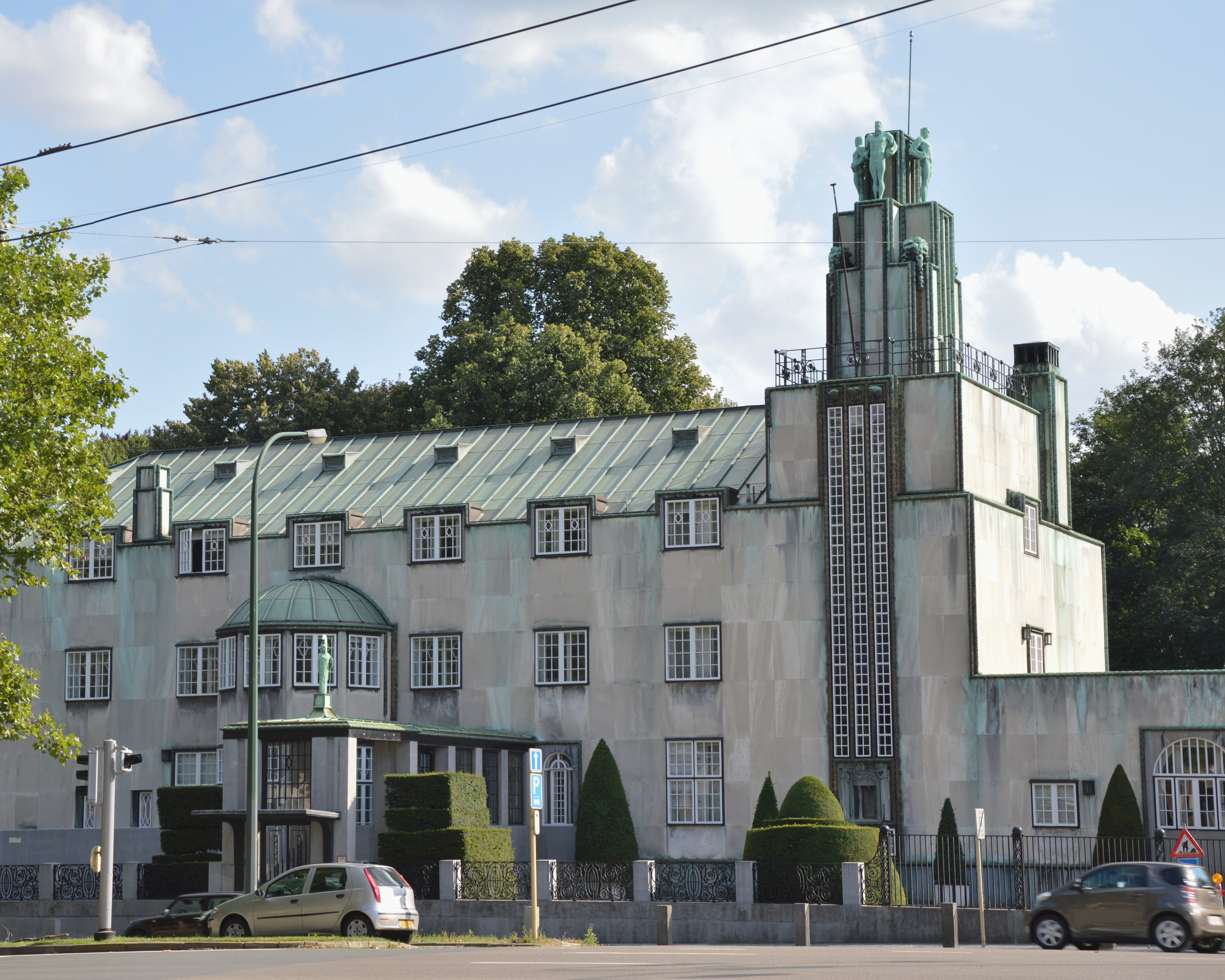 Palais Stoclet, avenue de Tervuren, n° 279/281 à Woluwé-Saint-Pierre.